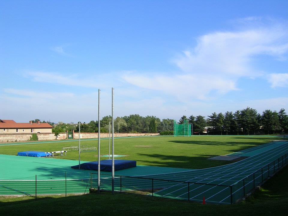 Panorama della pista comunale di atletica leggera di Olgiate Olona, vista dall'adiacente Villa Gonzaga, in seguito ai lavori di rifacimento del 2012.